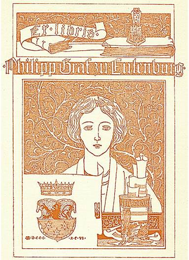 Joseph Sattler, Ex libris für Philipp Graf zu Eulenburg. Monogrammiert. Höhe 11,5; Breite 8,3 cm (Bild)